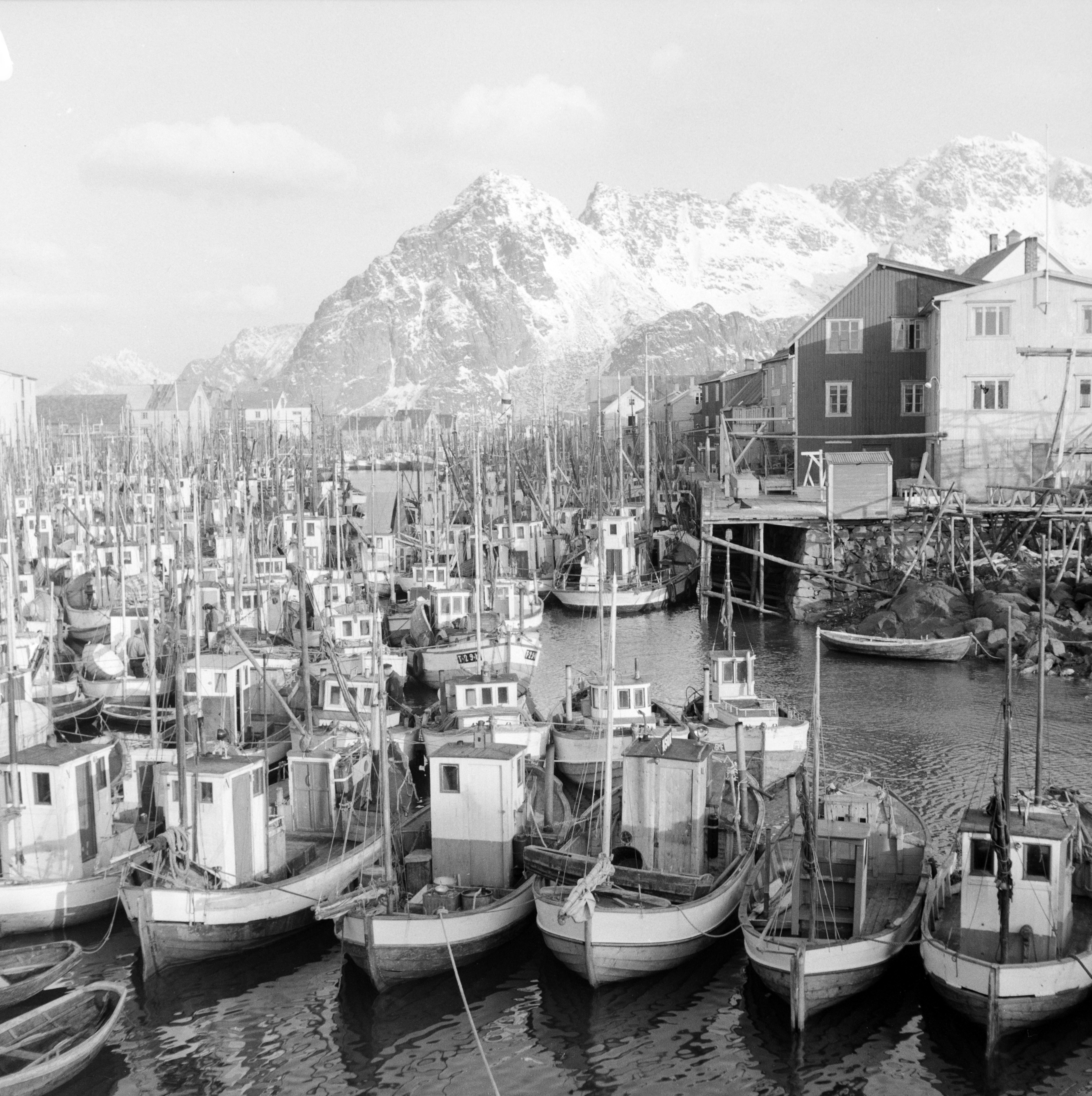 Bildet er hentet fra Nordlandsmuseet bildesamling etter Kanstad. Motivbeskrivelse: Henningsvær havn, båter Sted: Vågan, Henningsvær Nøkkelord: Stedsnavn Boliger Båter og fartøyer Motorbåter Havnevesen